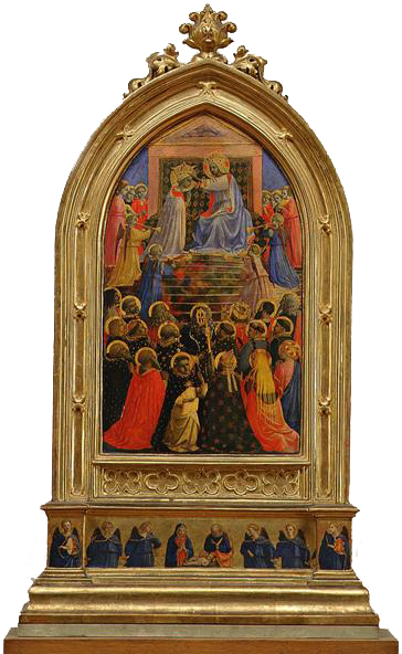 Angelico, reliquiario con incoronazione della Vergine